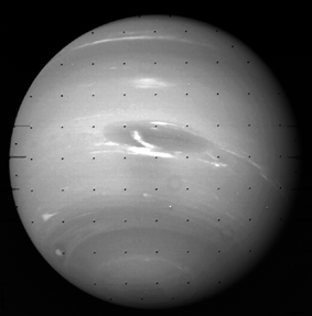 Neptunus, vanaf openbare bron